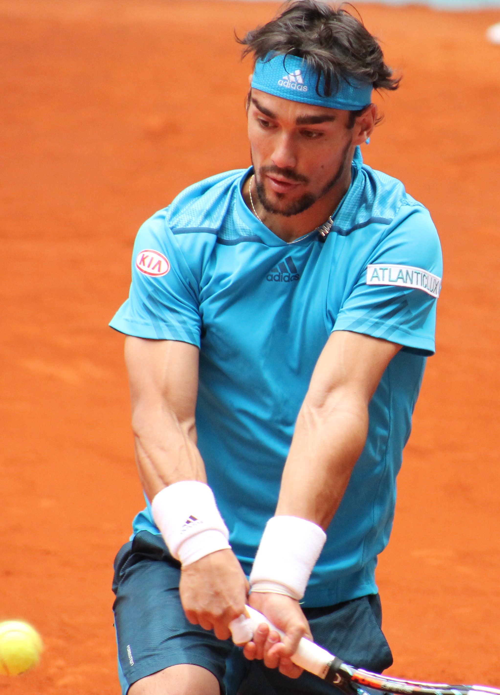 Fognini MA14 (4)